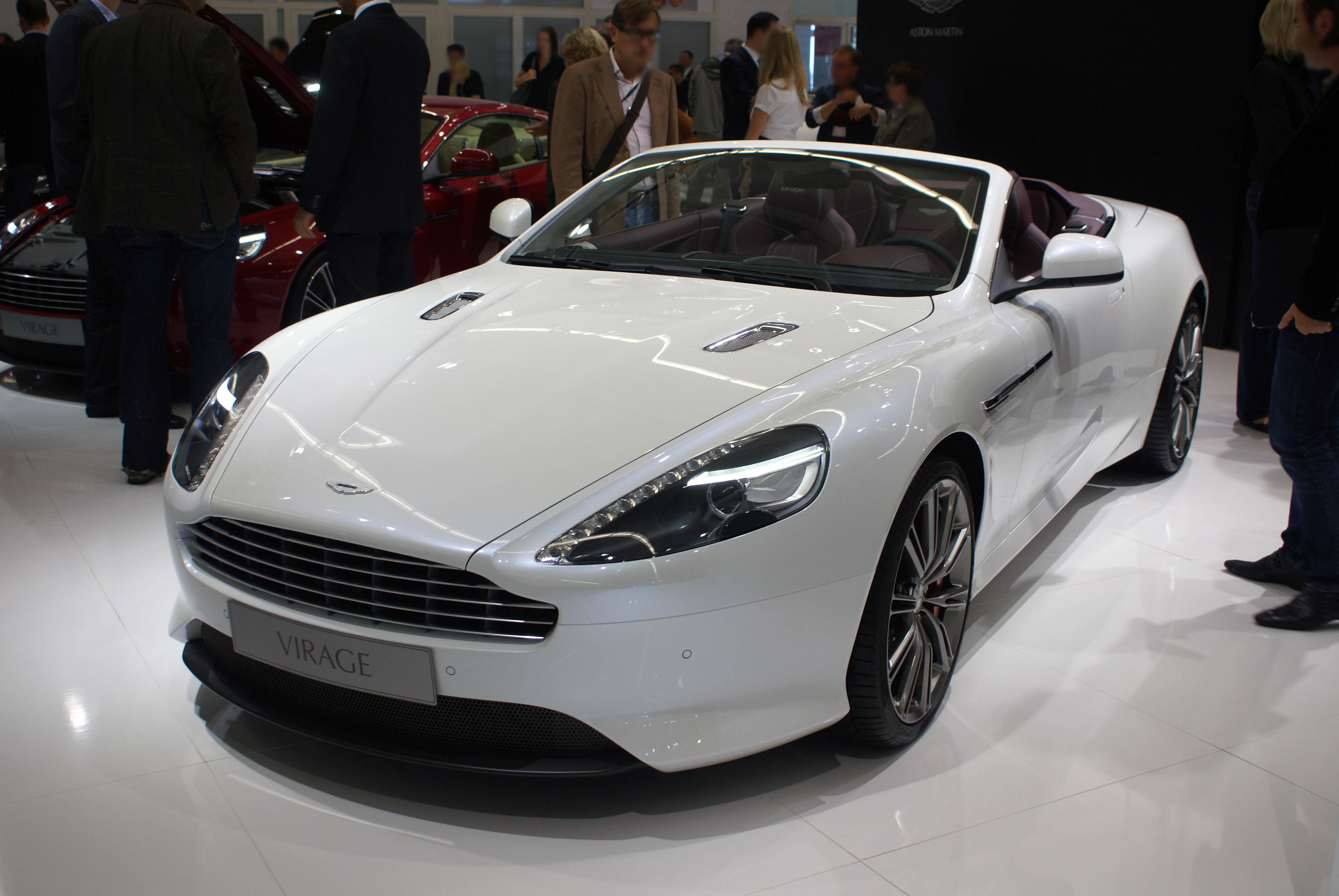 Aston Martin Virage Volante